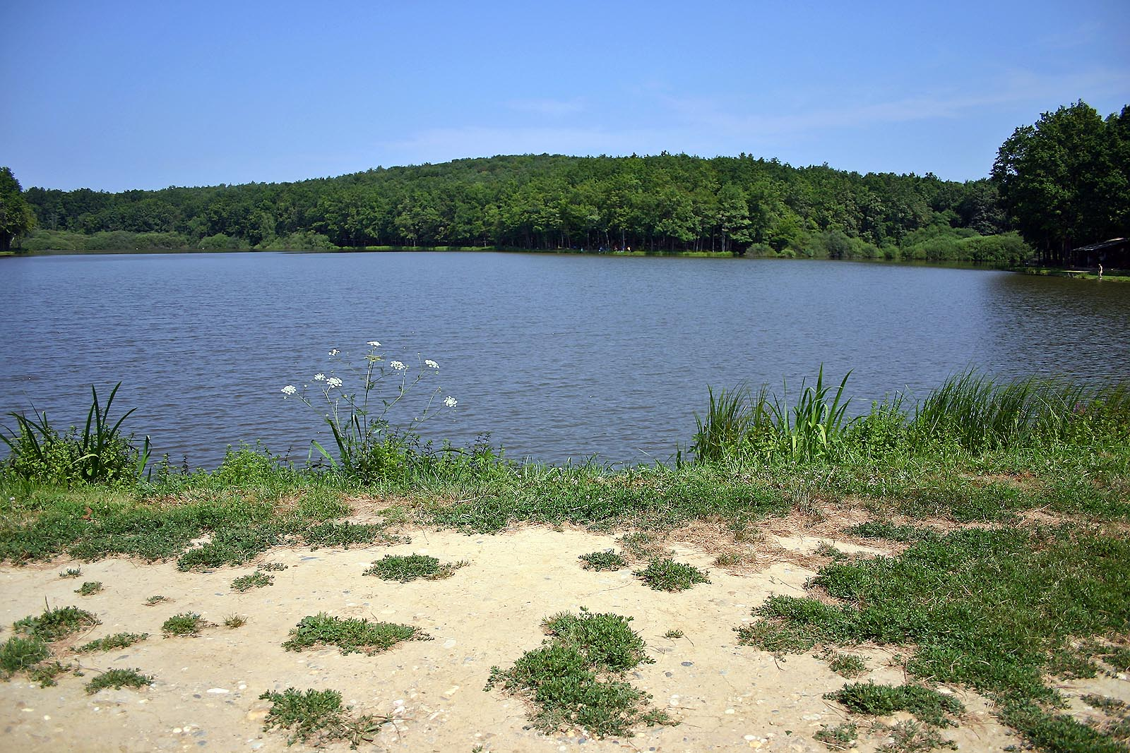 Bukovniško jezero, Prekmurje, Slovenija